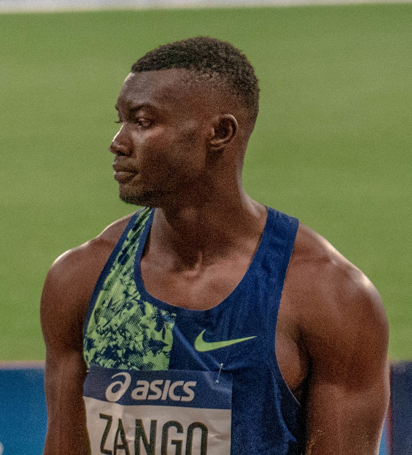 Meeting de Paris 2019 - Compétition d'athlétisme au stade Charlety - 24 août 2019